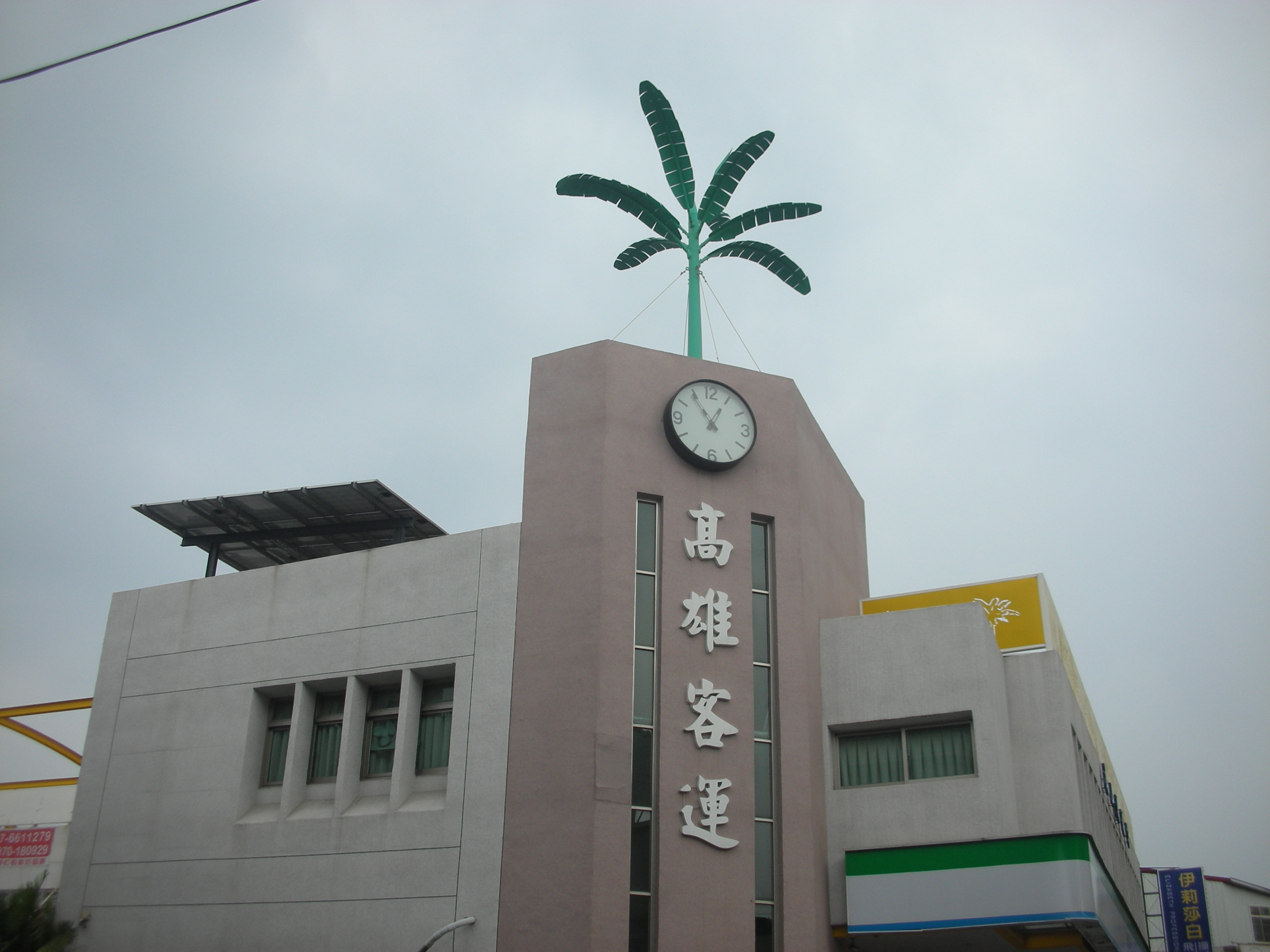 旗山轉運站，是高雄市旗山區內的一座轉運站，為高雄市公車六大轉運站之一，原高雄客運旗山南站改建。位於旗山區大同街與大仁街口。